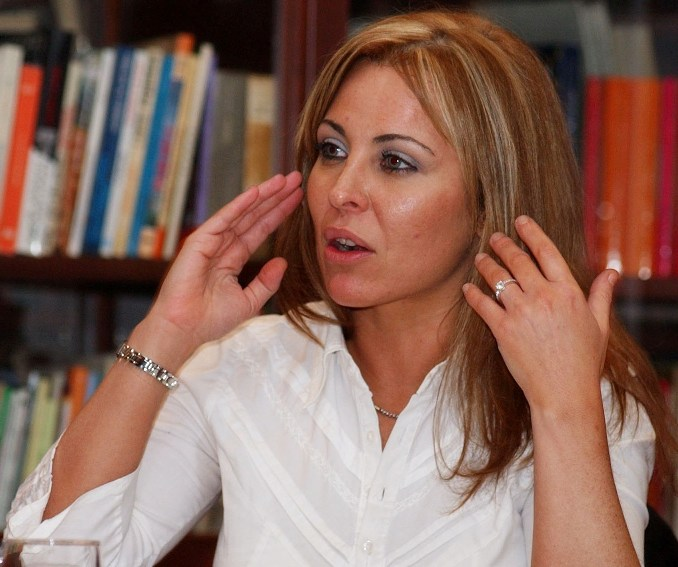 Karen Marón. Conferencia sobre Iraq y Oriente Medio. Diario El Tiempo. Bogotá. Colombia.